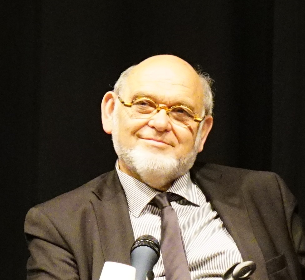 R.Hue, conférence à la médiathèque Falala.